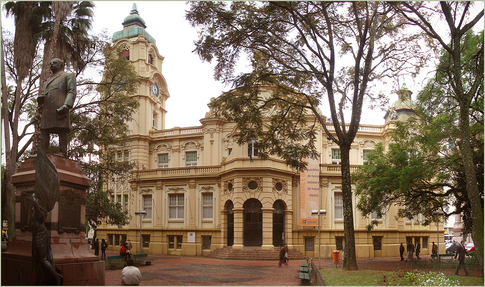 Memorial do Rio Grande do Sul, Porto Alegre, Brasil. Antigamente o prédio dos Correios e Telégrafos, na praça da Alfândega.